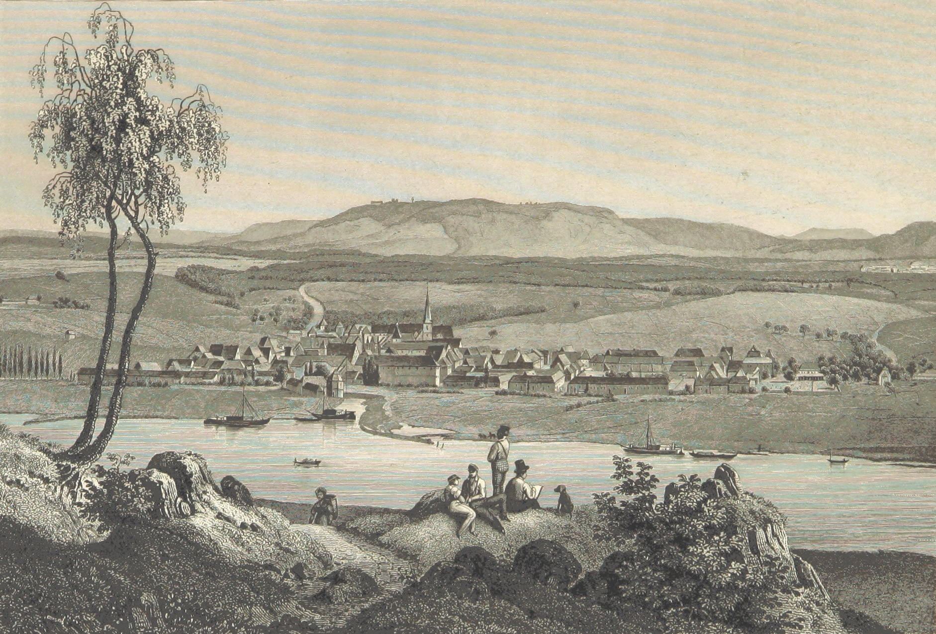 Marktsteft. Stahlstich nach Vorzeichnung von Fritz Bamberger, 1847, aus: Ludwig Braunfels; Die Mainufer und ihre nächsten Umgebungen. Verlag Carl Etlinger, Würzburg 1847. Gedruckt in der Kunstanstalt von Carl Mayer, Nürnberg.